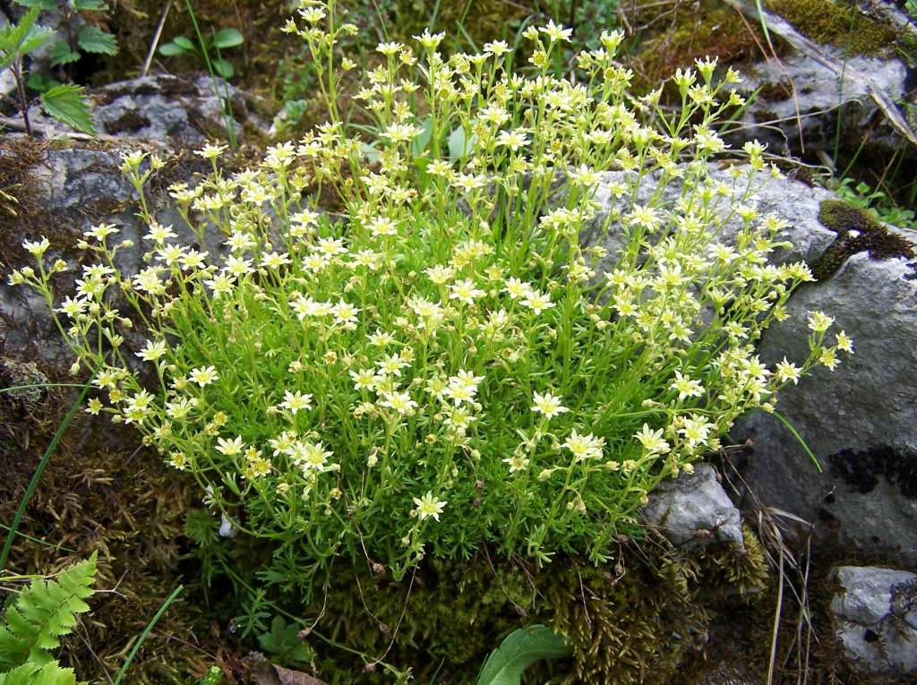 Saxifraga moschata